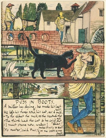 Гравюры по рисункам Крейна к сказке "Кот в Сапогах"